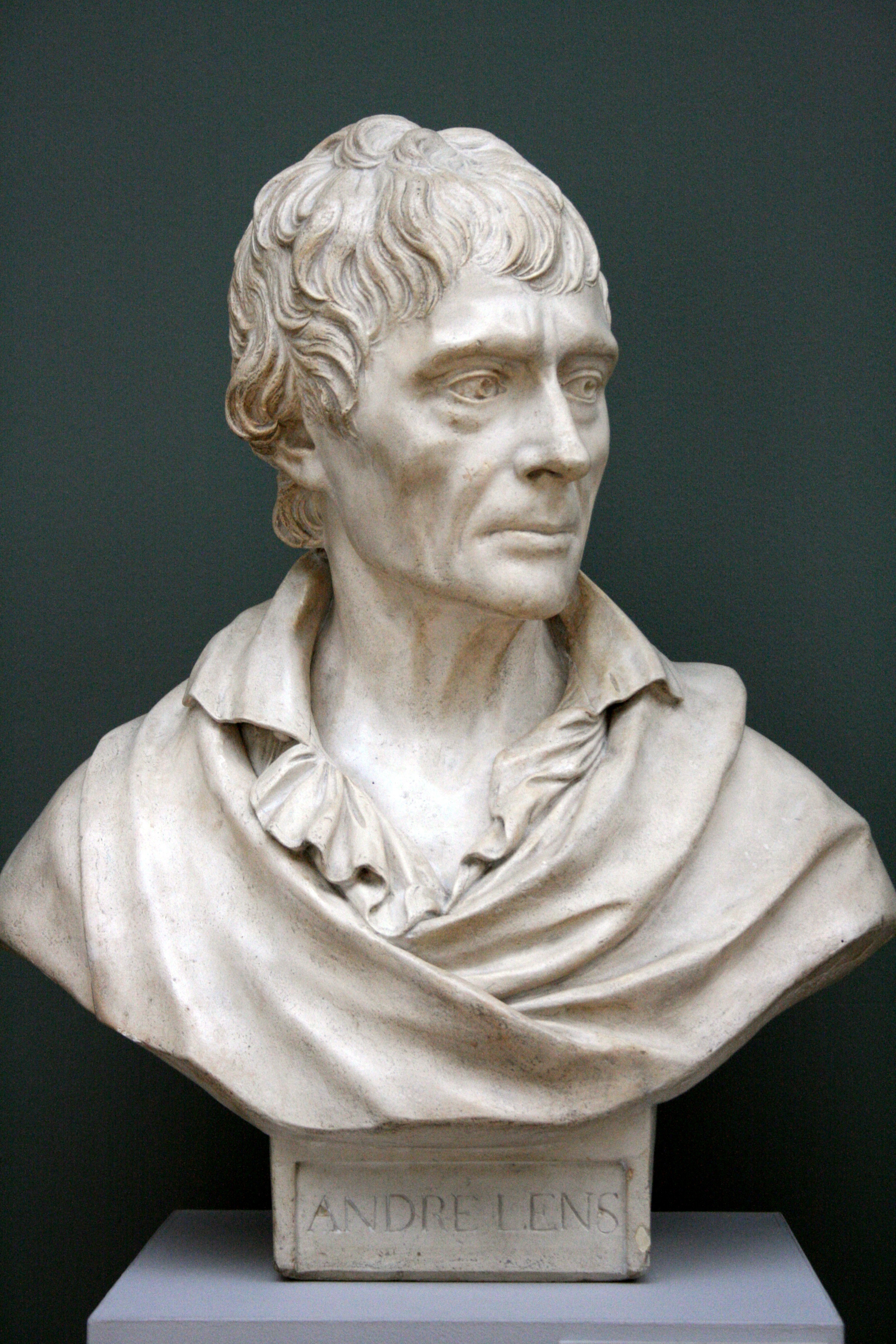 Buste d'André Lens par Gilles-Lambert Godecharle, Musées royaux des Beaux-Arts de Belgique, Bruxelles (Belgique)